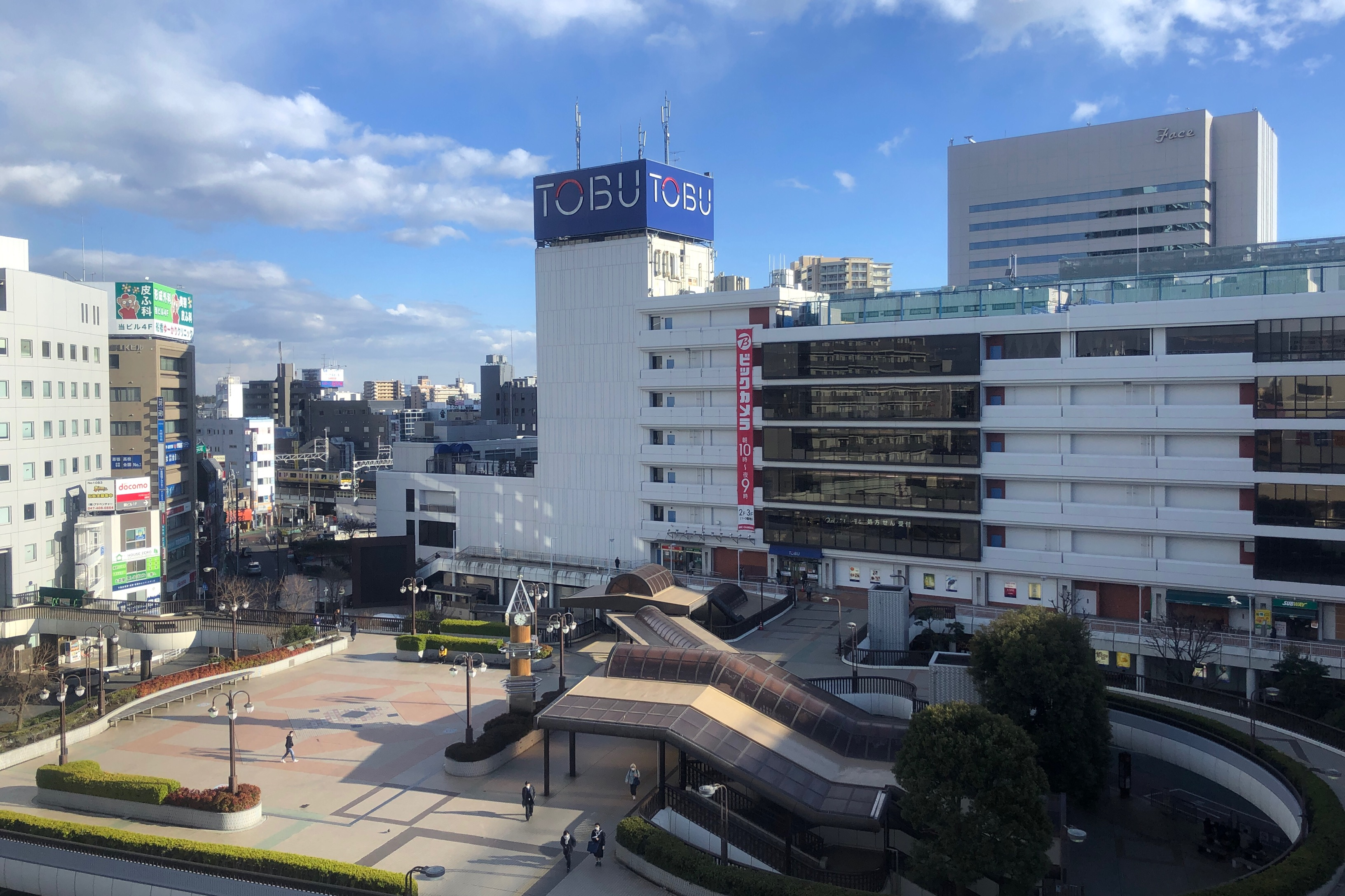 東武百貨店とJR総武線をまとめた1枚。 船橋駅北口を望んでいるが、コロナウイルス被害拡大の影響でか、人通りが少なくなり寂しい写真となってしまった。